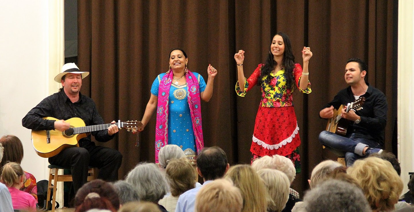 Karaván Familia